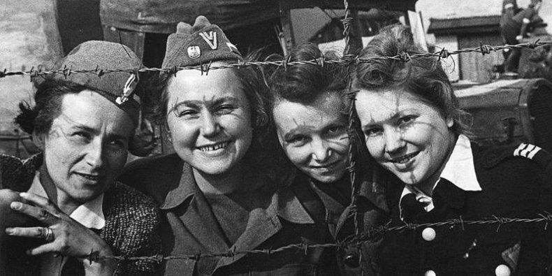 Oberlangen.-Kobiety-jeńcy-z-powstania-warszawskiego-po-wyzwoleniu-obozu